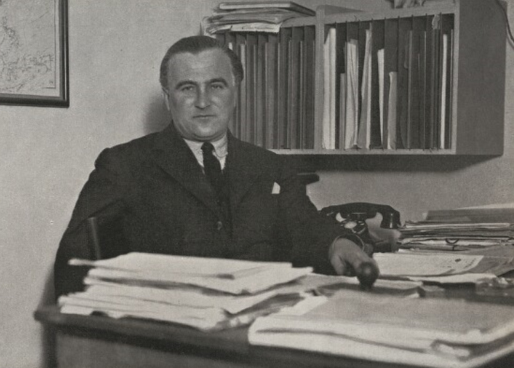 Ing. Alois Šmolík (1933), šéfkonstruktér a technický ředitel Vojenské továrny na letadla v Praze- Letňanech